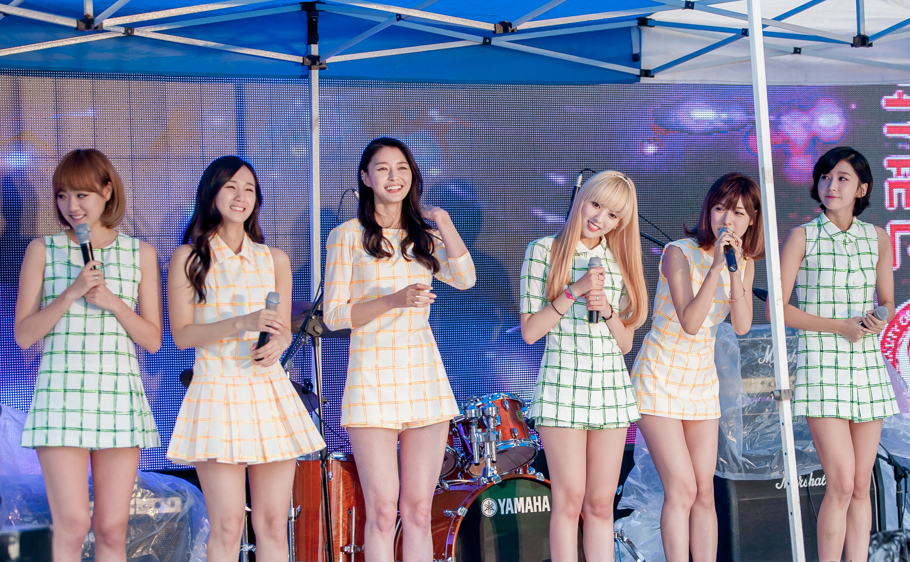 130928 고려사이버대학 축제 헬로비너스 by. 달덩이